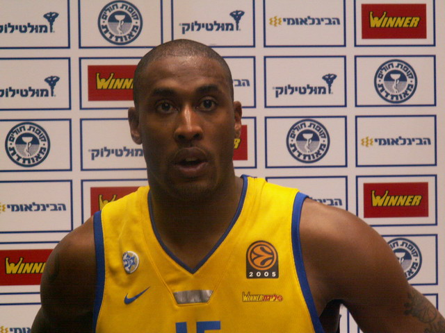 וויל סולומון צולם על-ידי אבי קדמי This picture was taken by Avi Kedmi